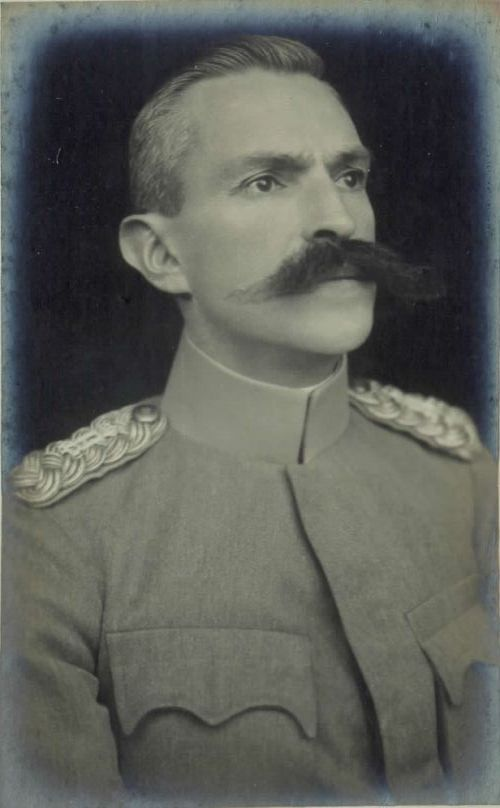 Rudolf Maister